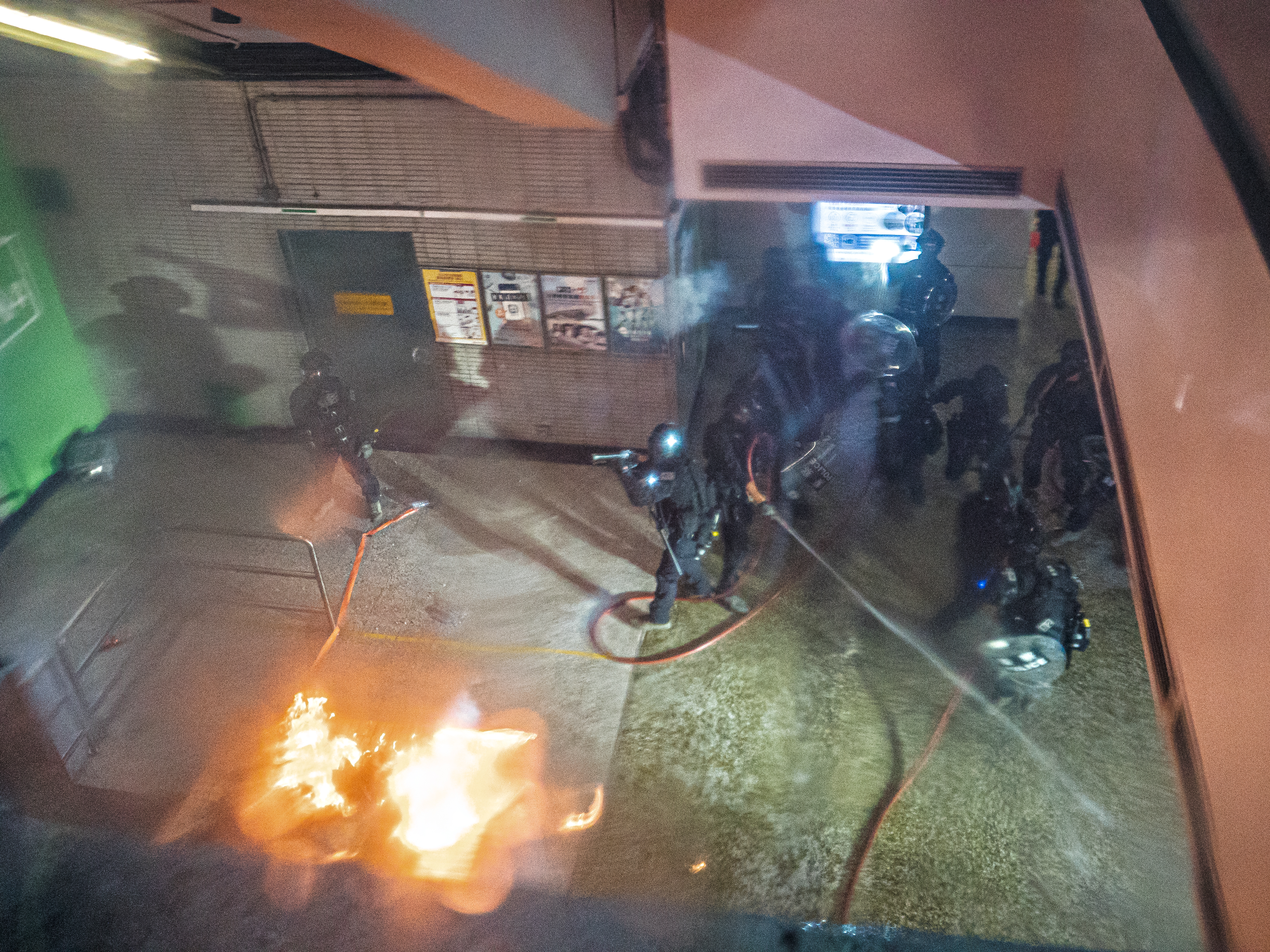 2019-09-29 全球反極權大遊行 Anti-totalitarianism rally (Hong Kong)